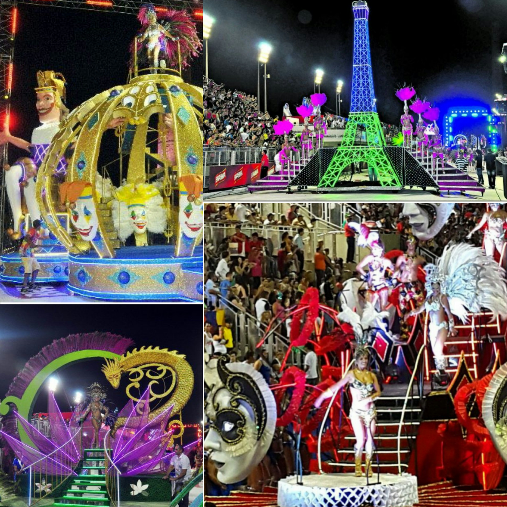 Destaques de Reinas y apertura de comparsa, y carrozas de clubes del Carnaval Encarnaceno